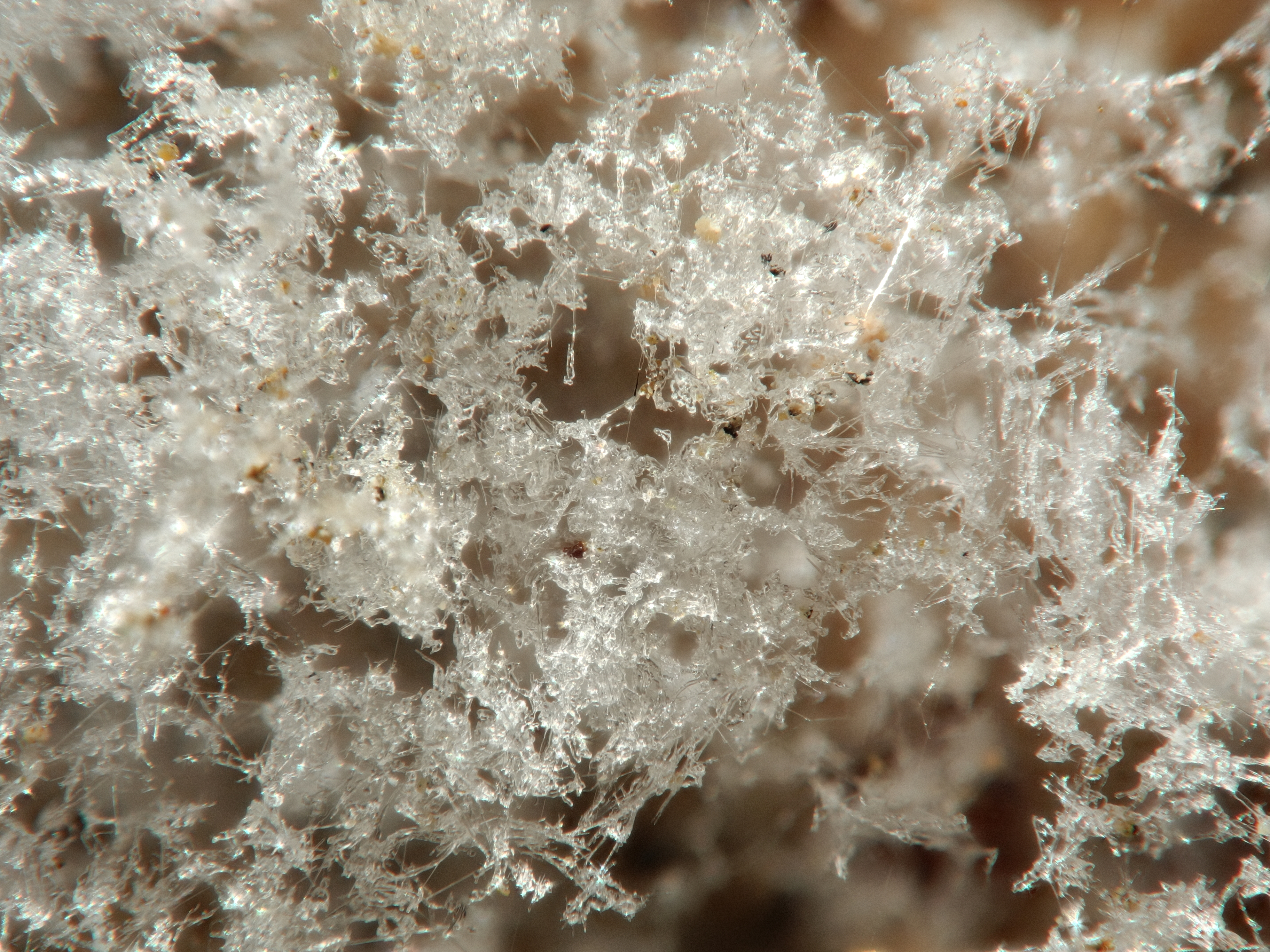 Focus stacking of 37 pictures (using Zerene Stacker).Salpêtre (focus stacking). Image composée de 37 photos prises avec la bonnette Raynox MSN-505 et assemblées avec Zerene Stacker.